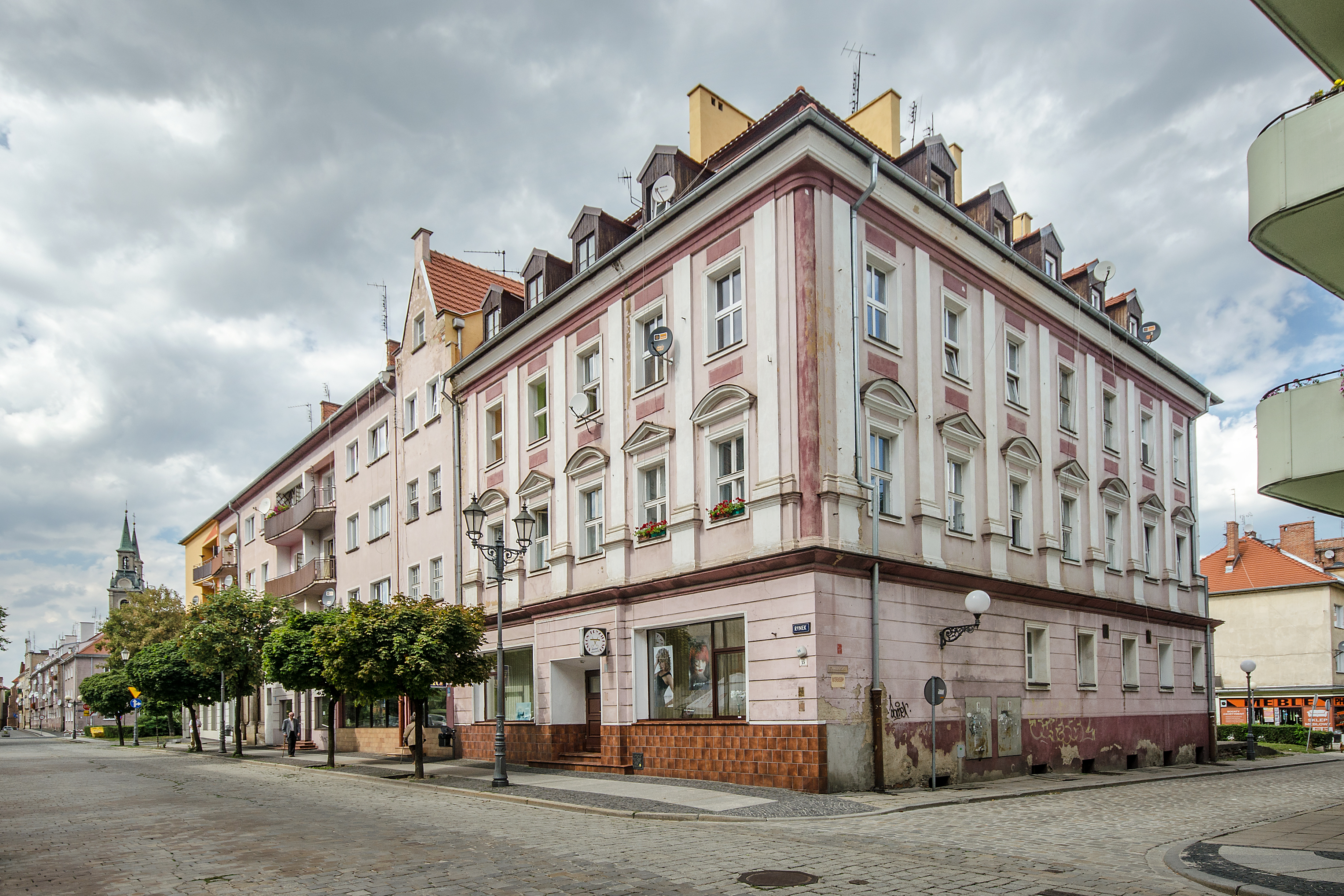 Brzeg, dom, 1784, XIX, XX